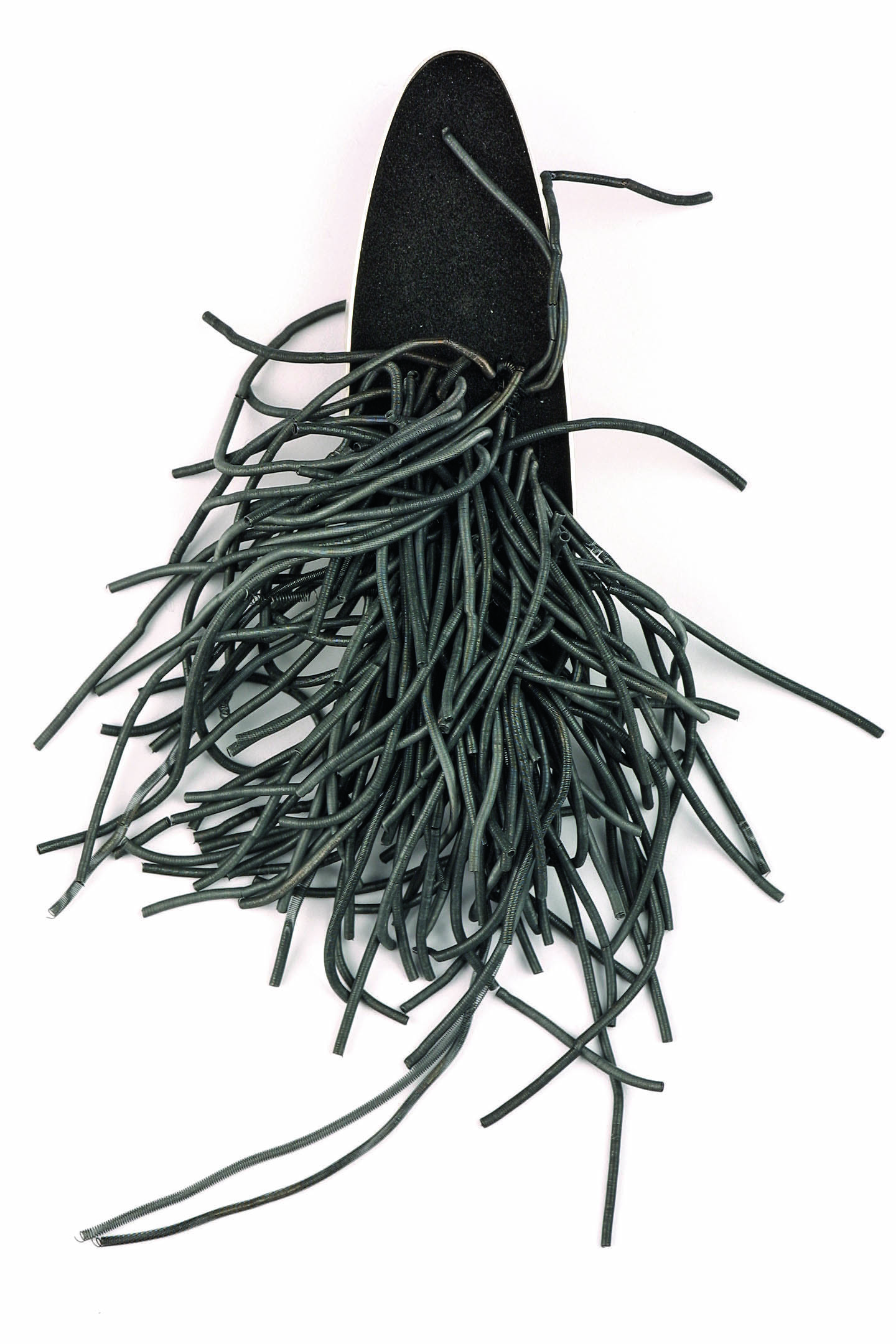 Ehisnõel "Medusa III" (2004). Kõrgus 90 mm. Materjalideks tumendatud hõbe ja kumm. Kuulub Bollmanni kollektsiooni Austrias. Autor: Kadri Mälk.